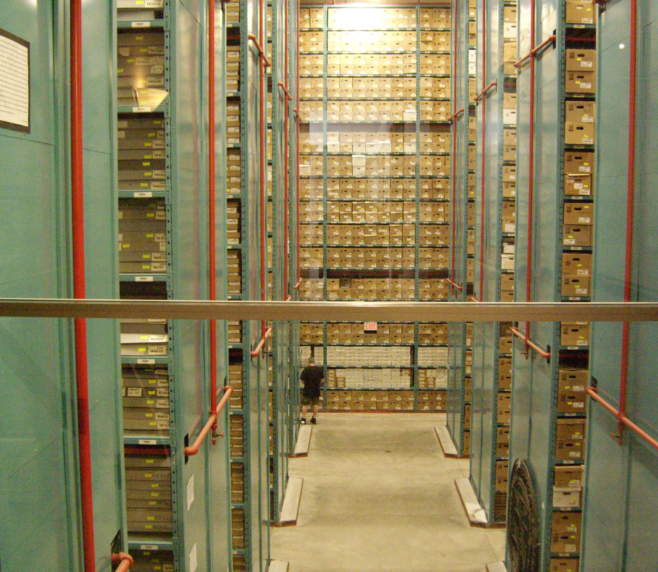 Standregale im Stadtarchiv von Toronto, Canada